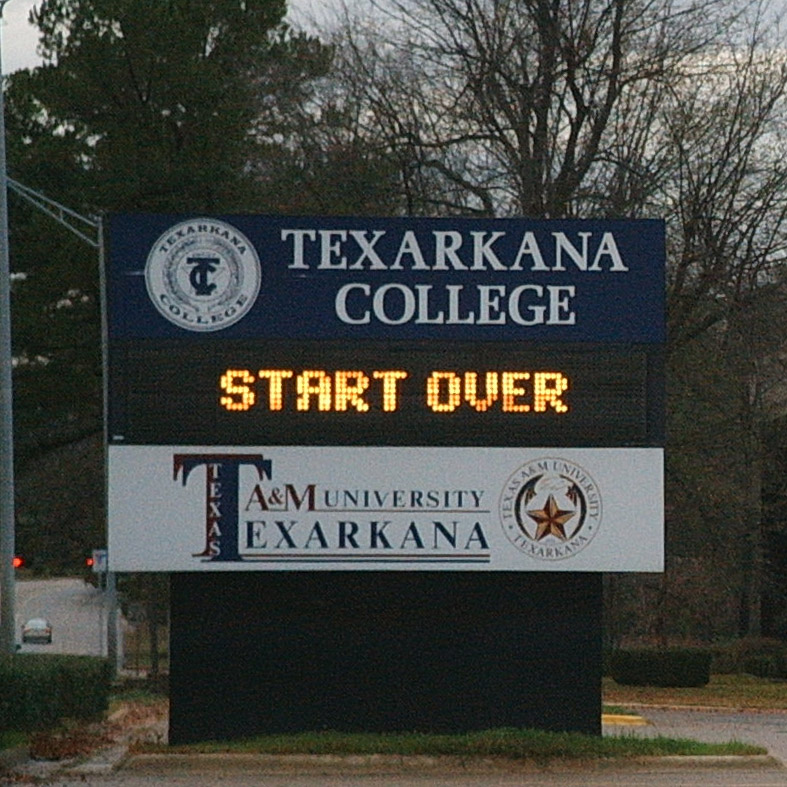 Texarkana College on Robison Road in Texarkana